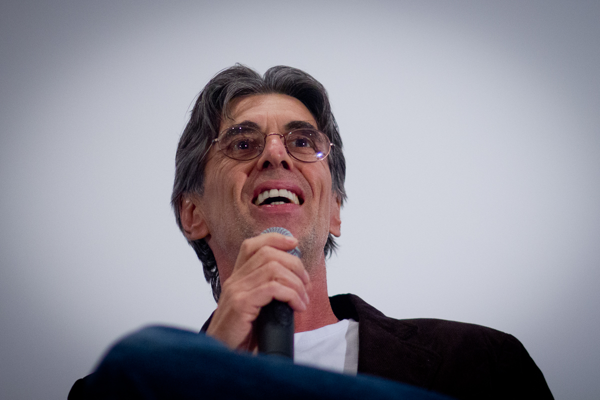 Guilherme Reis (Cena Contemporânea) na abertura do II Encontro Ibero-Americano de Redes de Cultura, em Brasília. 23/05/2012 (CC BY-SA) Cultura de Red